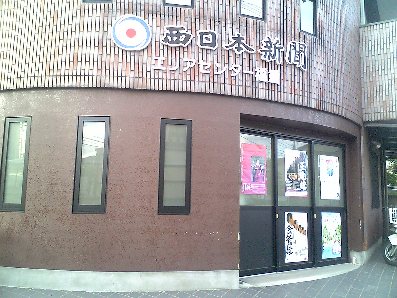 福岡県福岡市にある西日本新聞エリアセンター福重